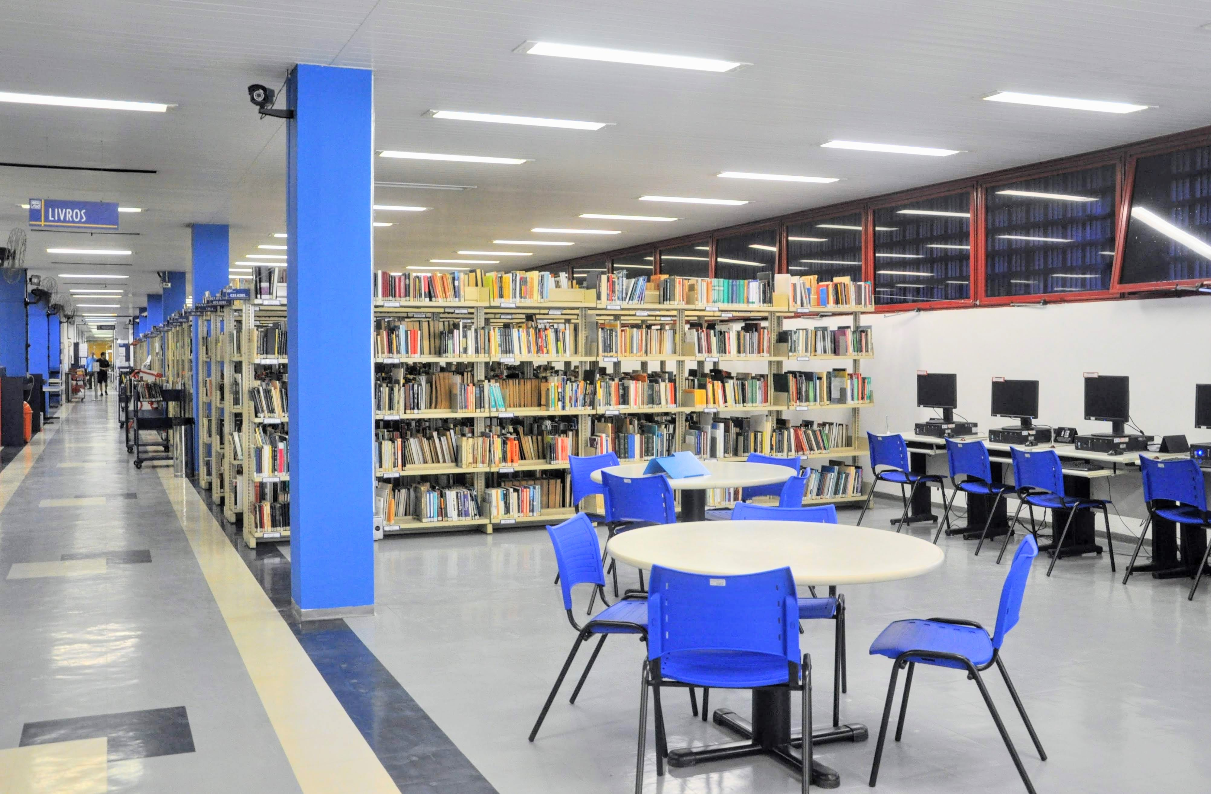 Vista geral do interior da Biblioteca a partir da entrada, mesa de estudos em primeiro plano, acervo de livros ao fundo